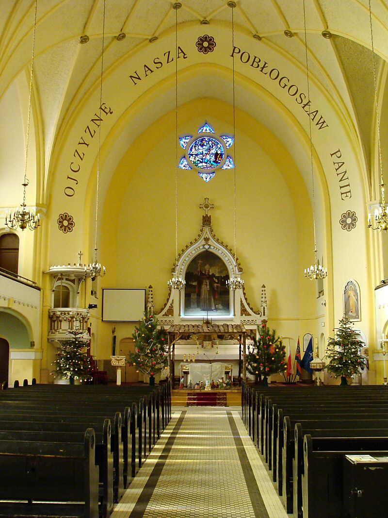 Szczecin - Kościół Garnizonowy Świętego Wojciecha na Placu Zwycięstwa